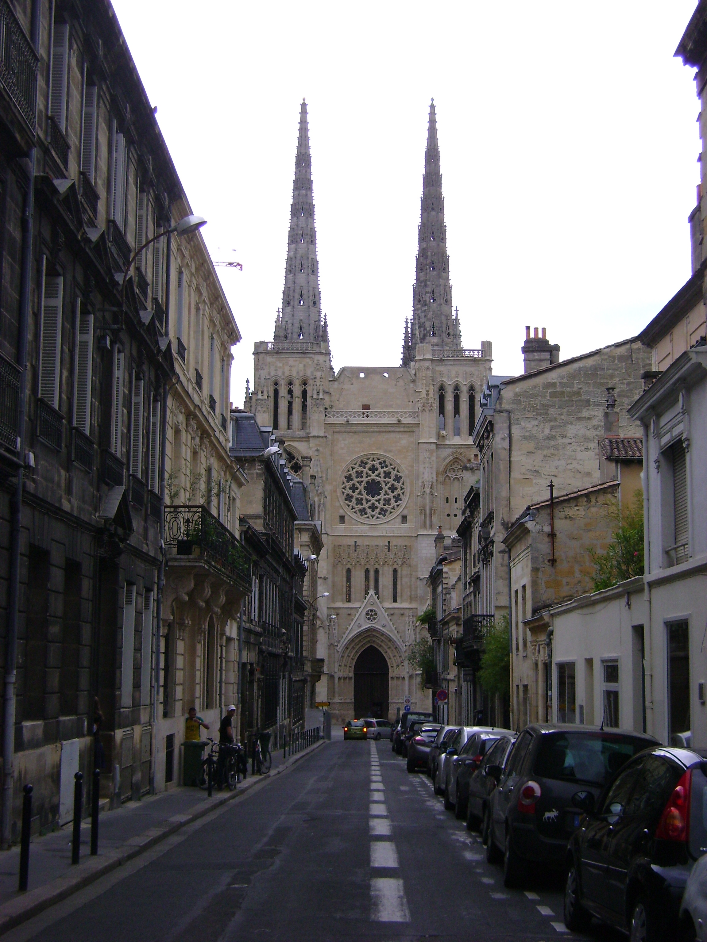 Cathédrale Saint-André de Bordeaux. Le transept sud vu de la rue du commandant Arnould .